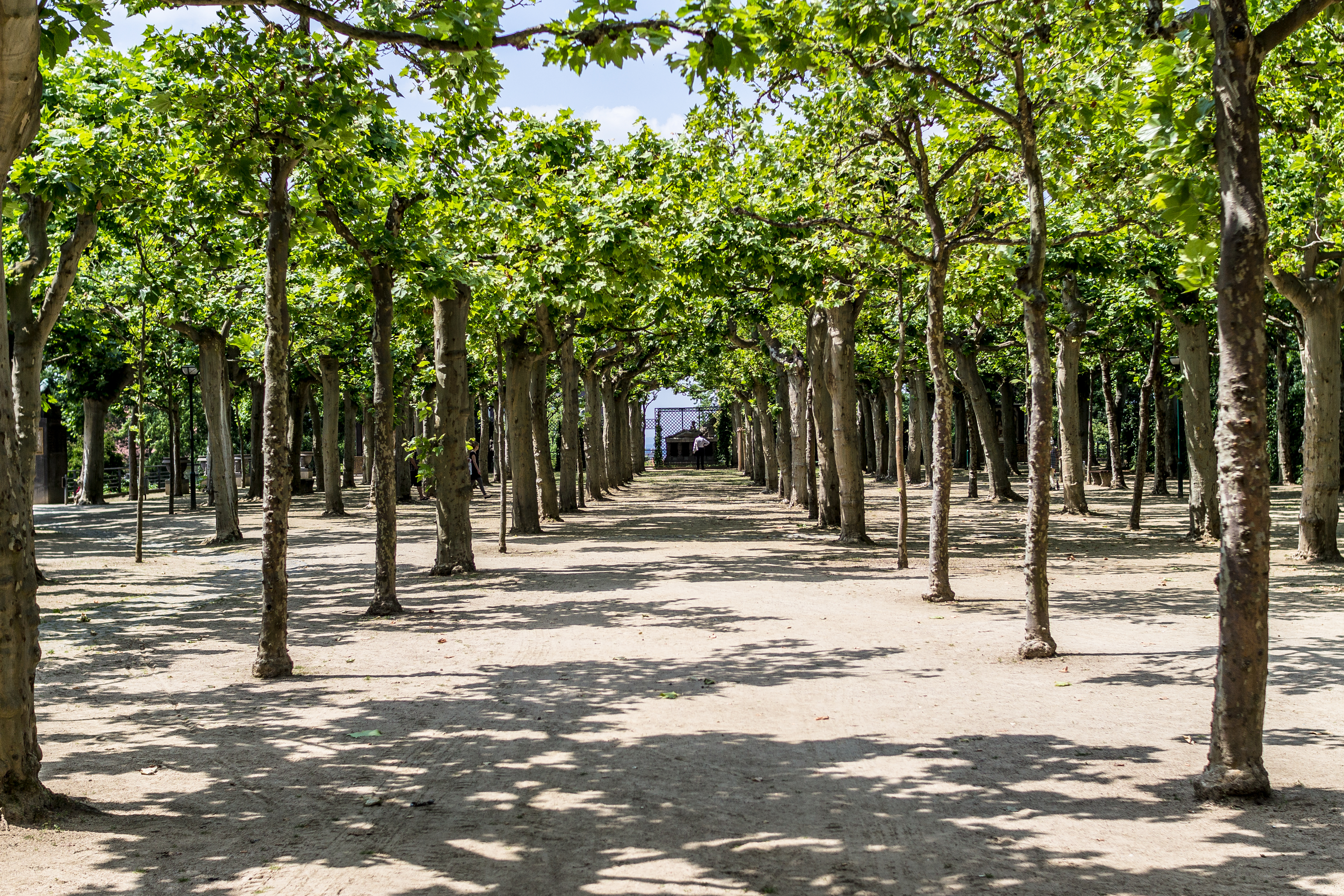 Platanenhain auf der Mathildenhöhe vor dem Hochzeitsturm in Darmstadt.